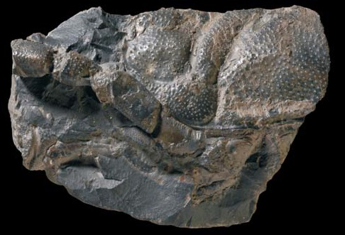 Exceptionally 3D−preserved fragment of shrimp (Eryma cumonti Van Straelen, 1921, UJF−ID.11906), lateral view, note the appendages and the finely granular carapace